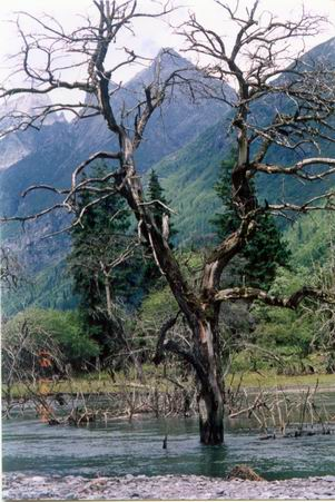 枯树滩, 中国四川zh:四姑娘山双桥沟 Jamguo摄于2002年8月 版权所有（见下）